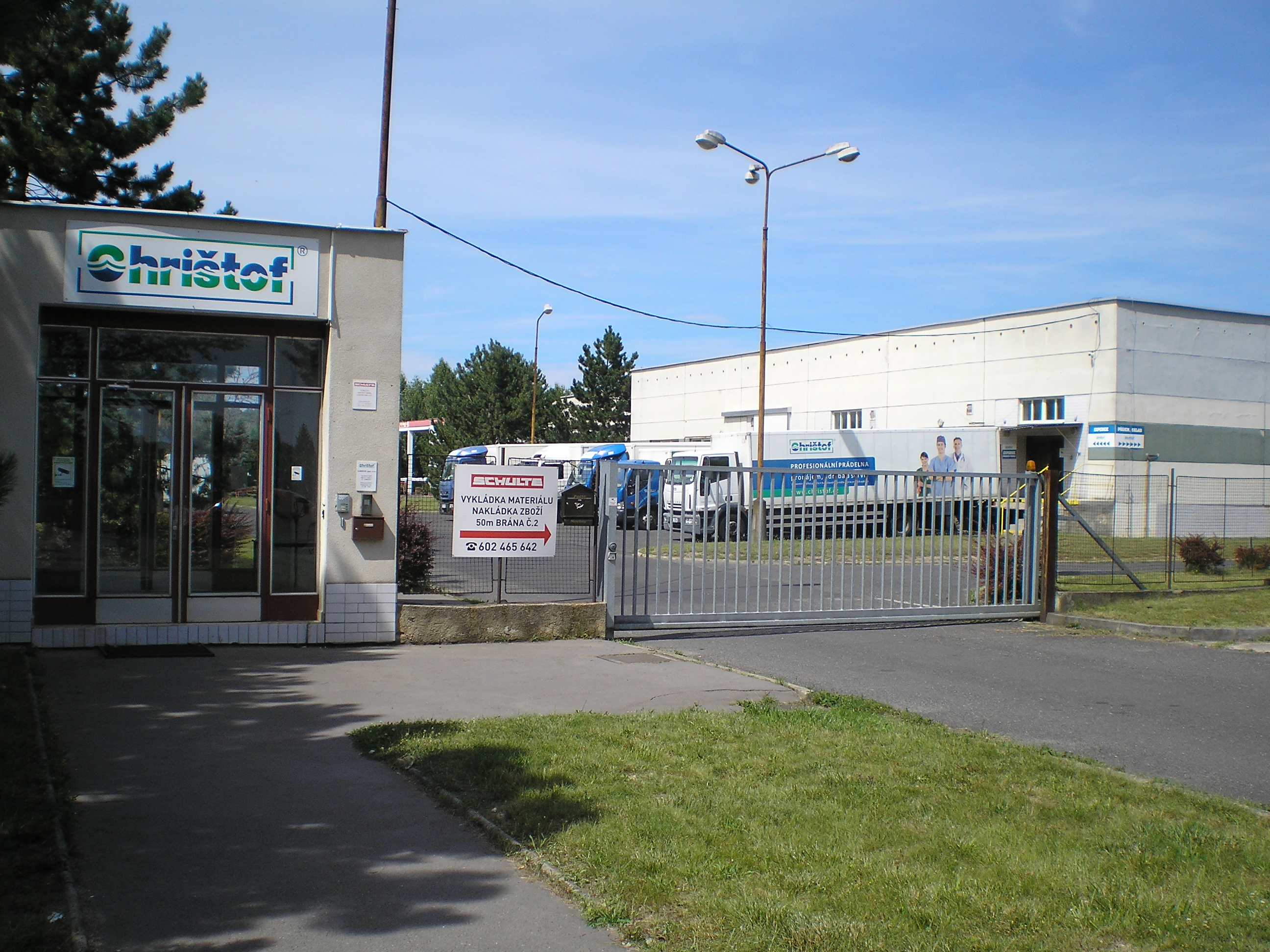 Vrátnice a vjezd do prádelny, Radouňská 681, Štětí.